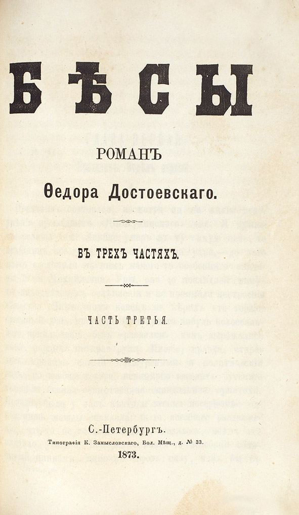 Обложка первого отдельного издания романа Ф. Достоевского "Бесы", 1873